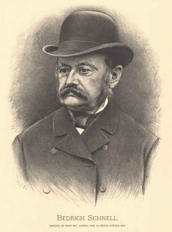 Bedřich Schnell (1808-1897), mecenáš Ústřední matice školské